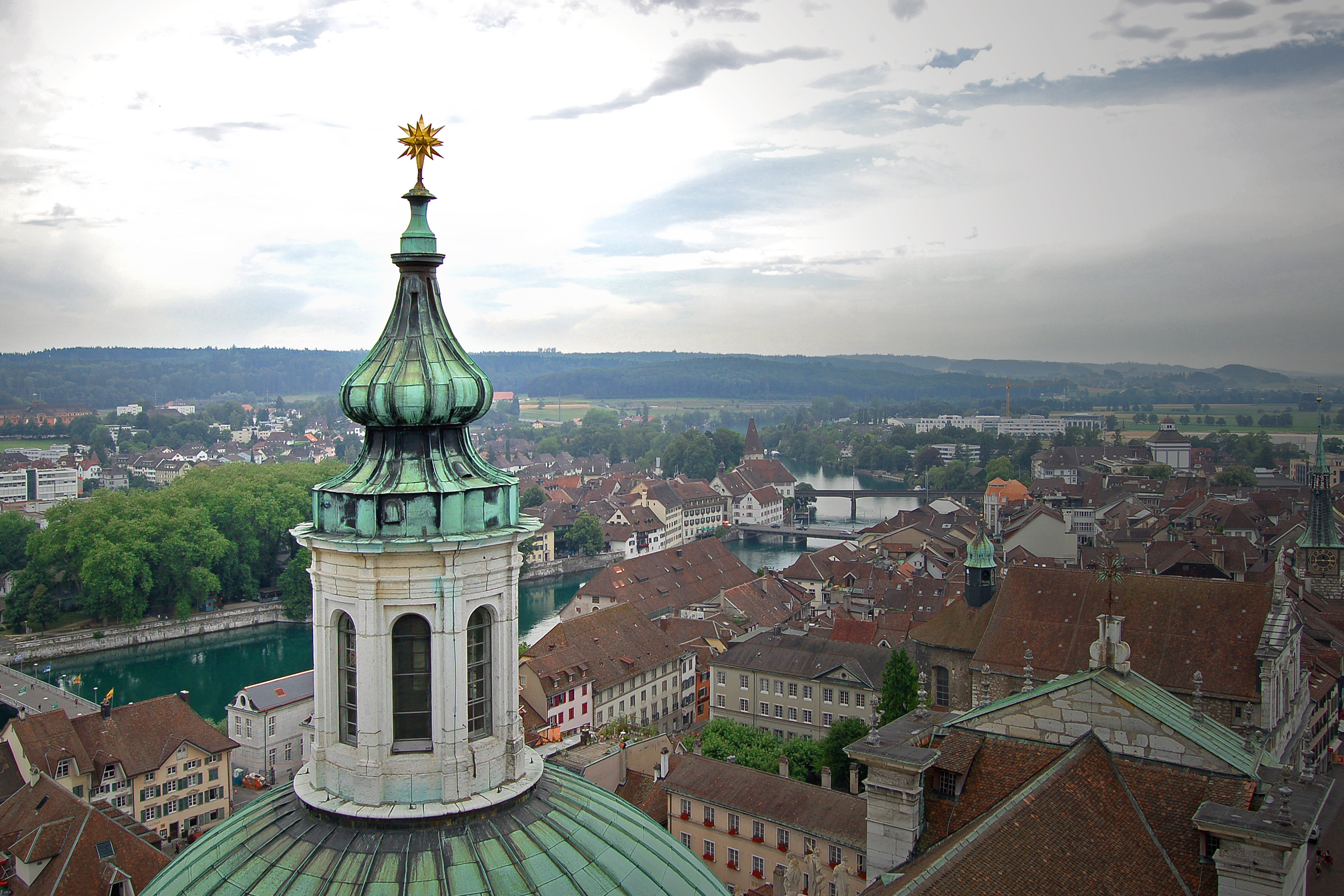 Solothurn Panorama Suedwest Richtung Vorstadt